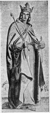 van